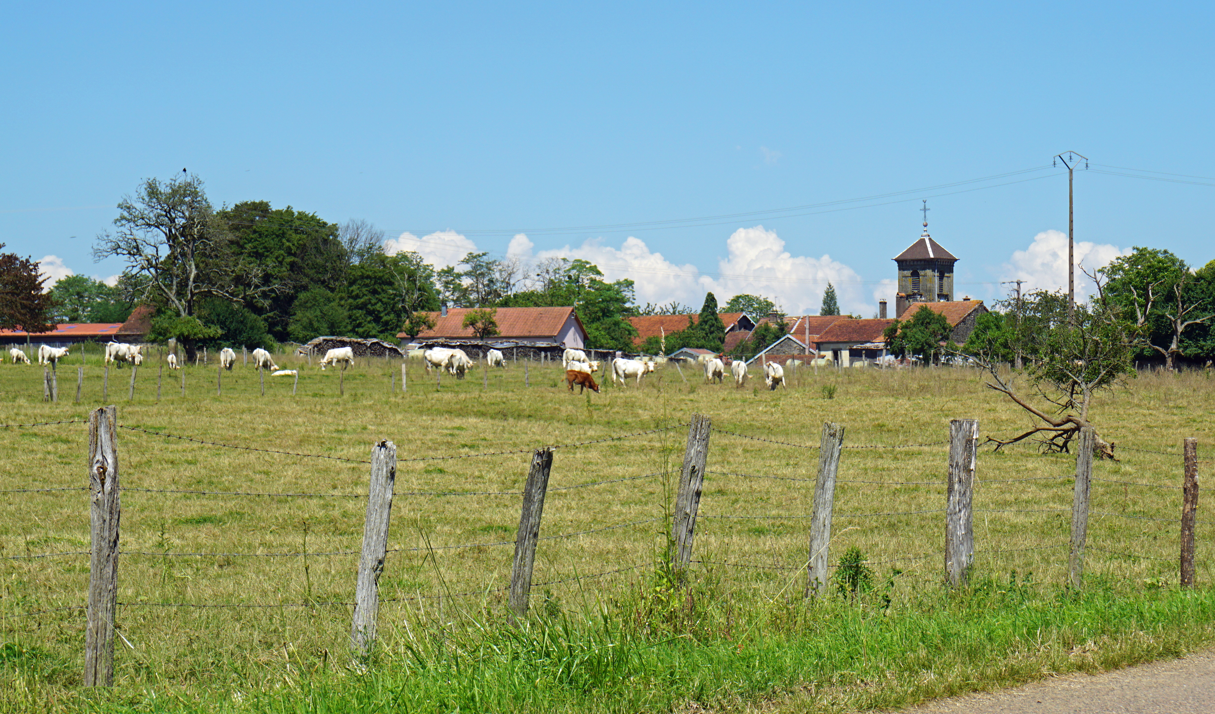 Servigney.